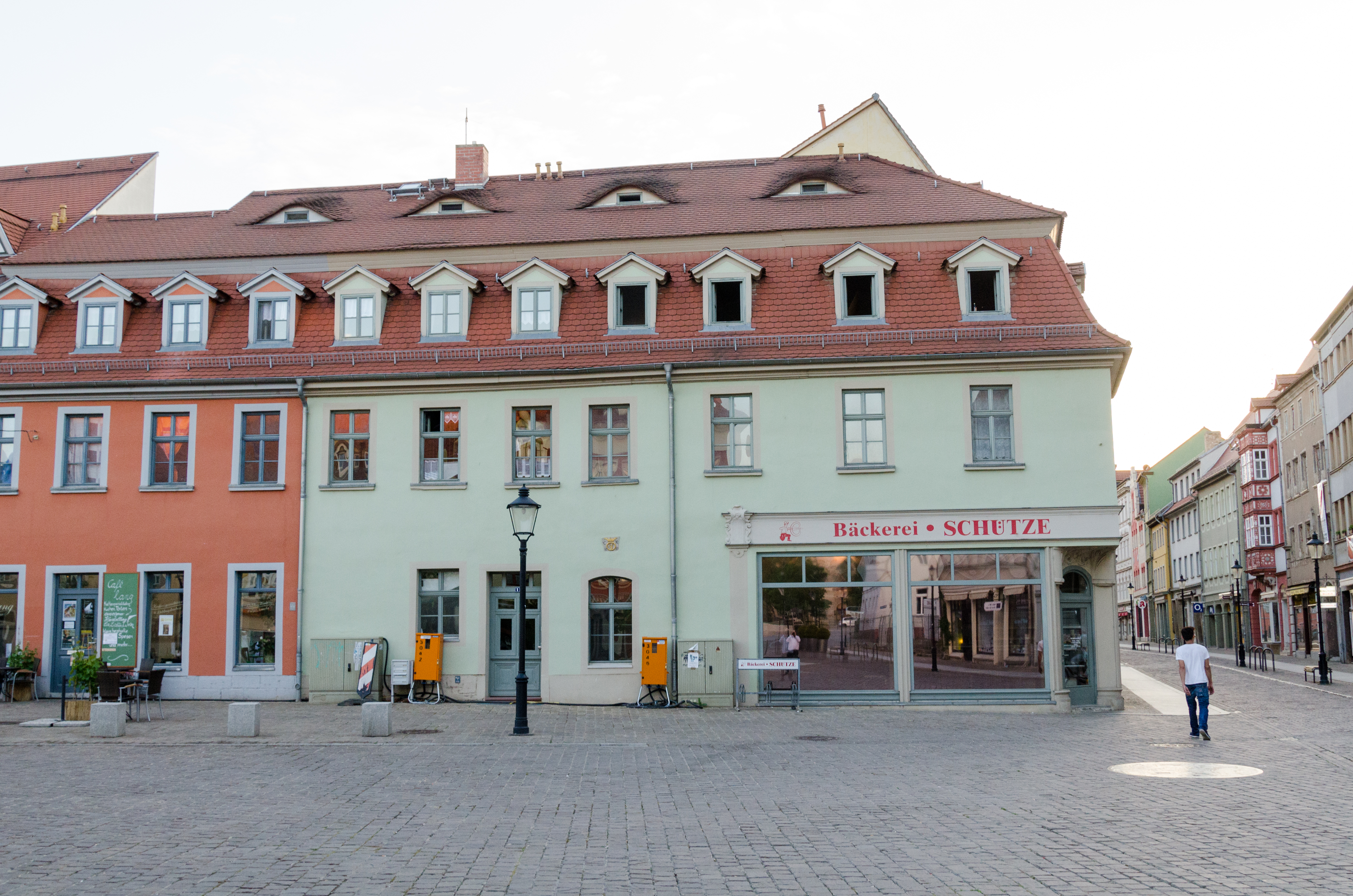 Naumburg, Holzmarkt 1